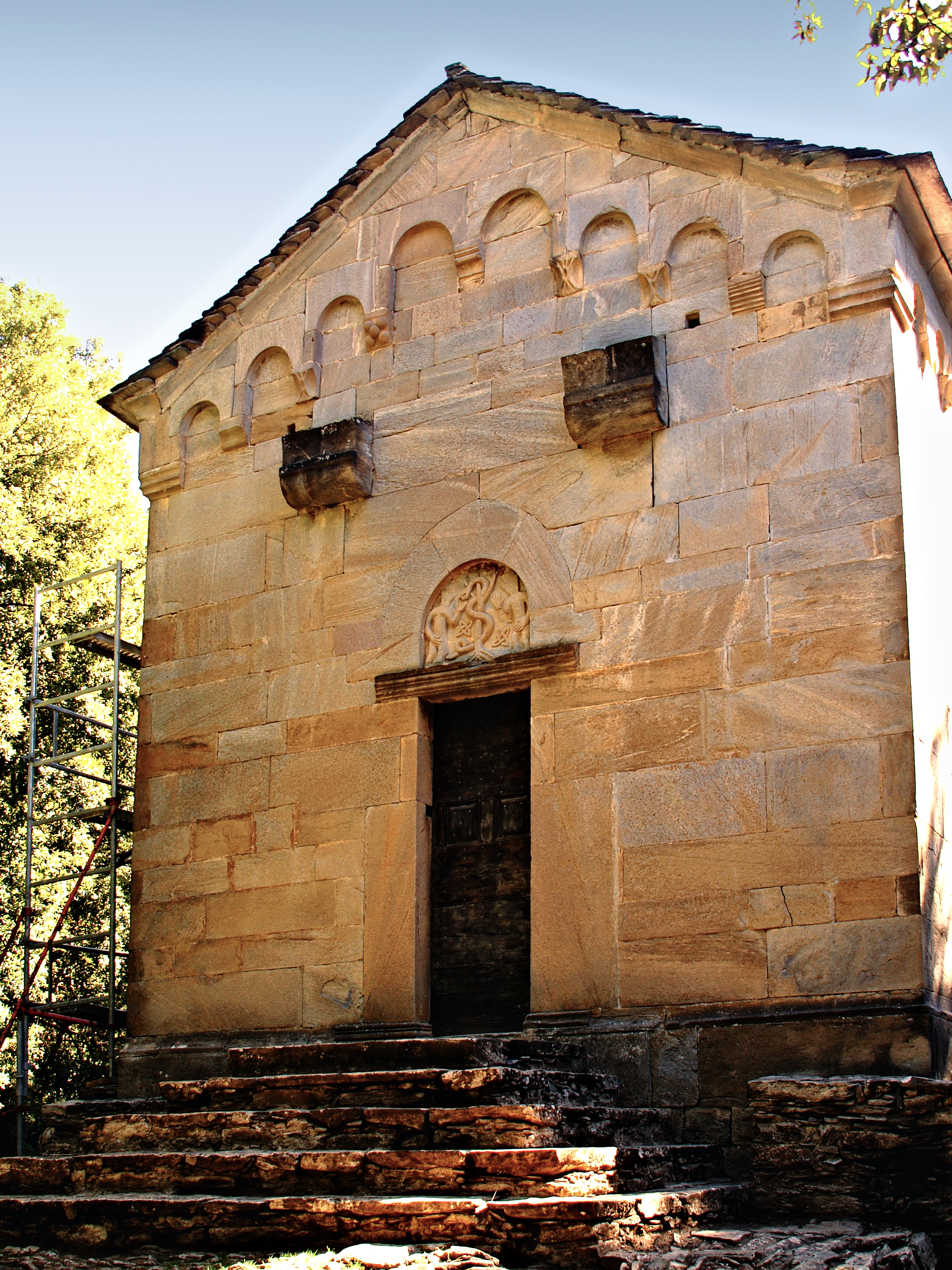 Cambia - San Quilicu en réfection (mars 2009)